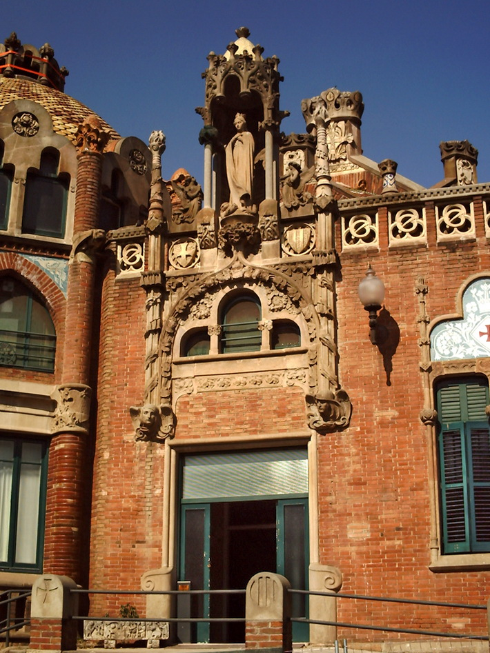 Portada del pavelló de la Puríssima, dins de l'Hospital de Sant Pau